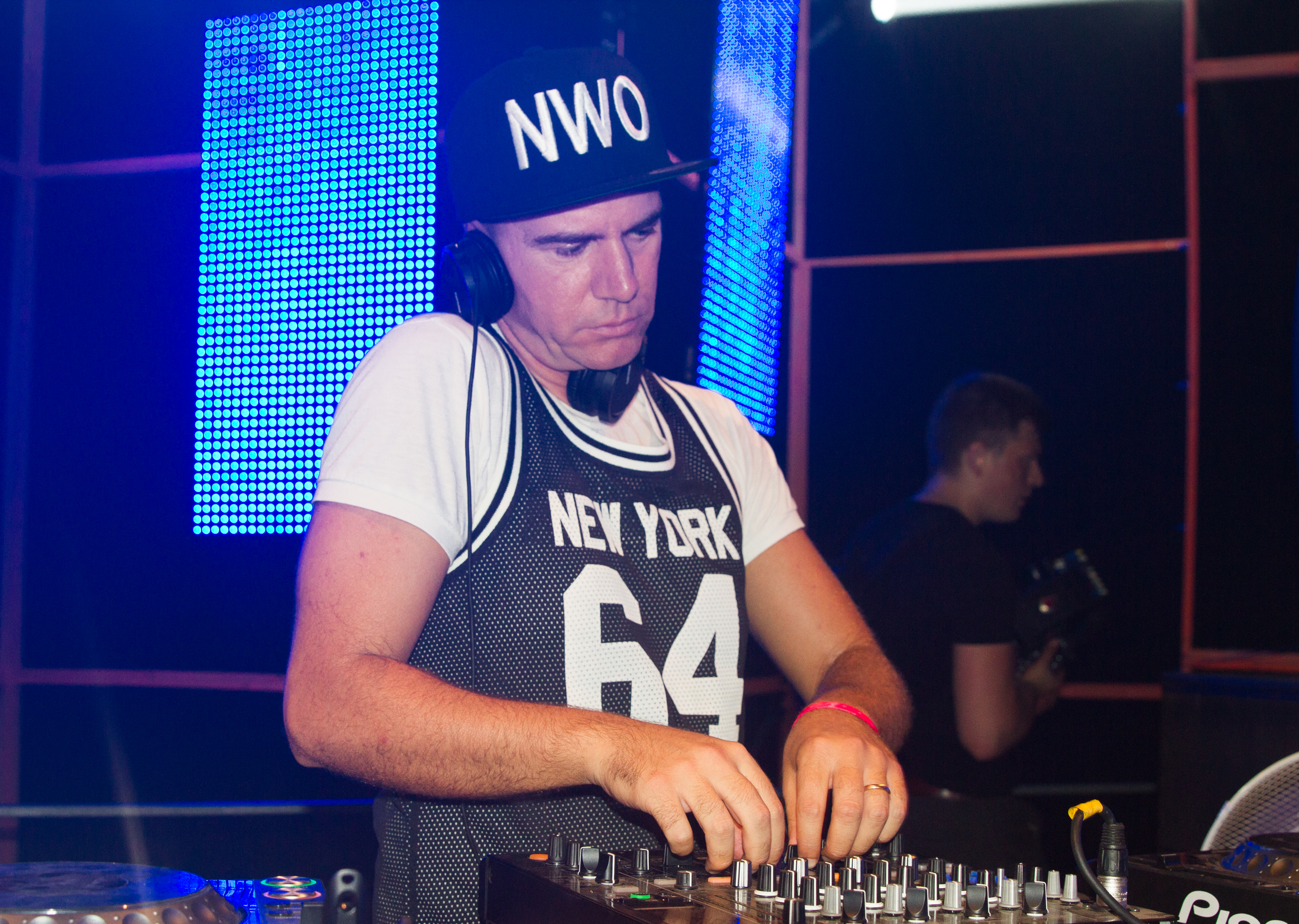 Zatox präsentiert New World Order beim 14. Airbeat-One Dance Festivals das vom 16. bis 19. Juli 2015 auf dem Flugplatz Neustadt-Glewe stattfand.